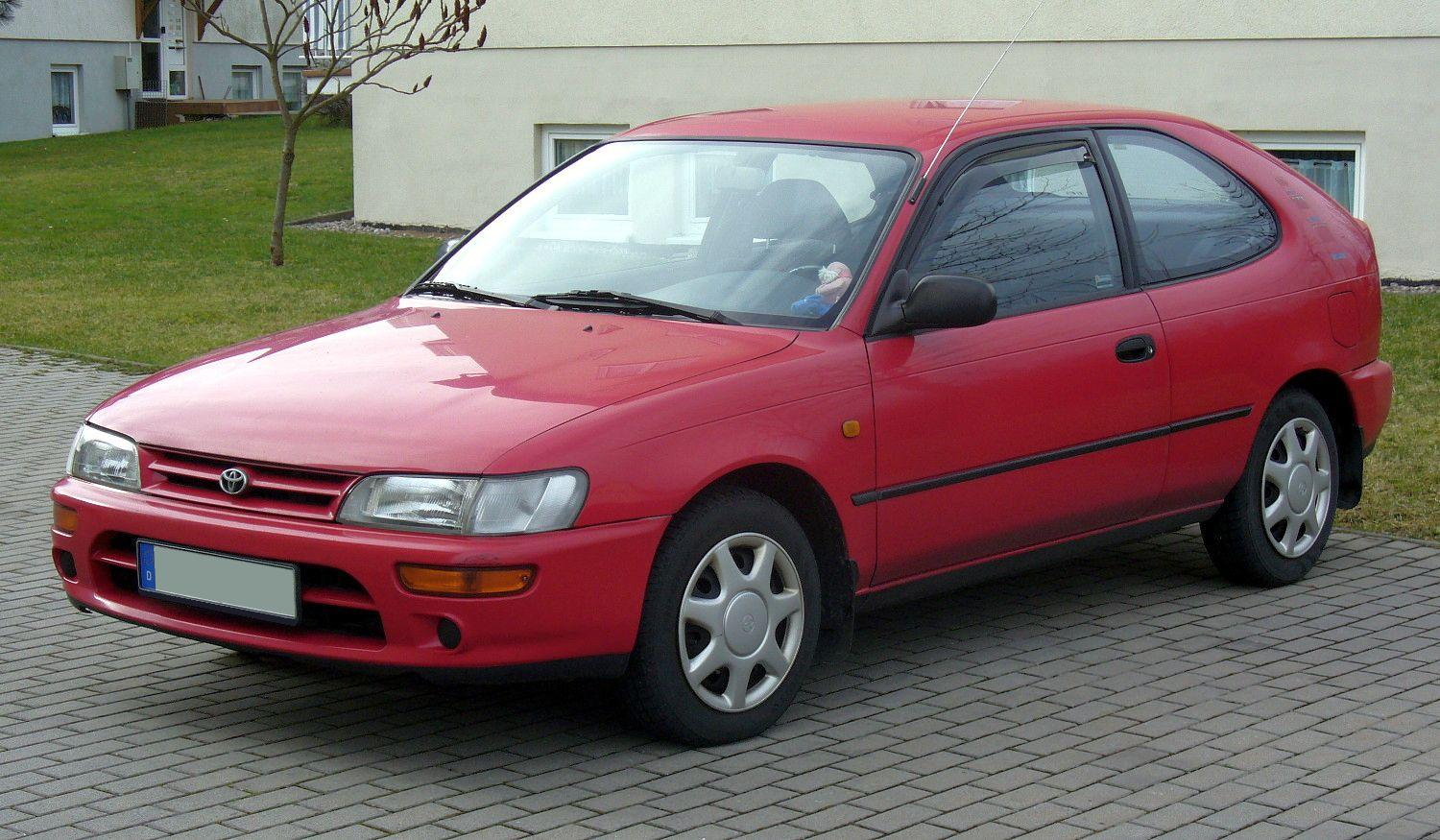 Toyota Corolla 100